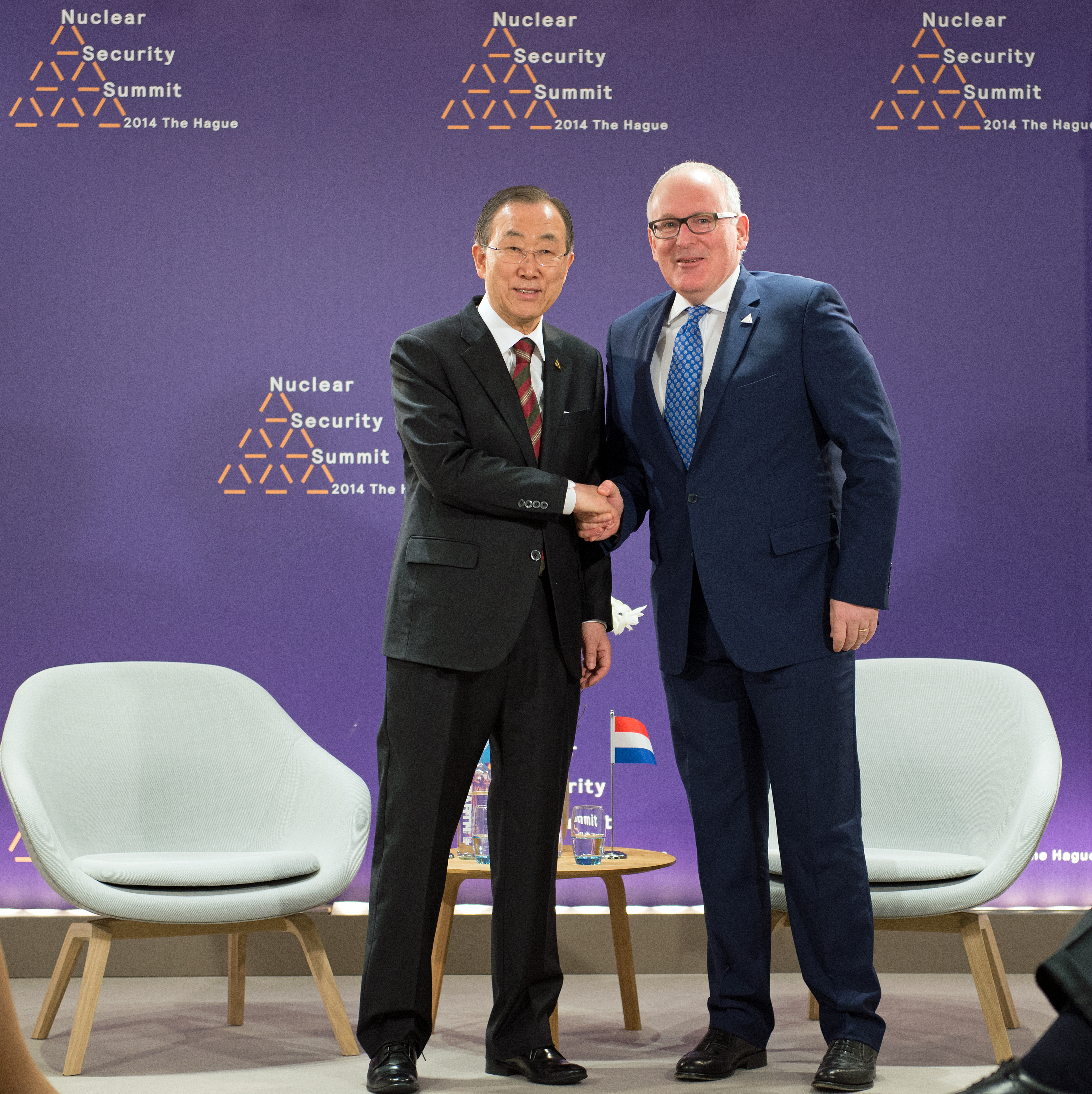 140325 Ban Ki-moon en Timmermans tijdens NSS